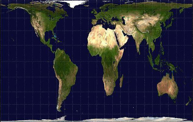 Proyección de Peter